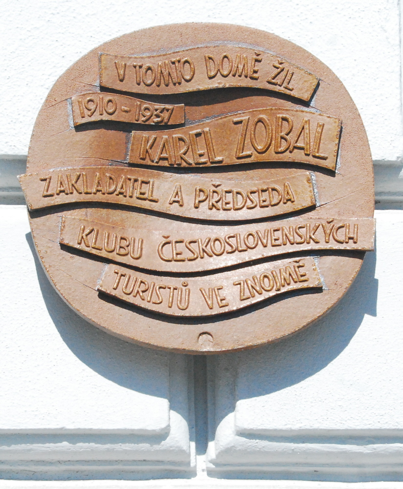 Gedenktafel für Karel Zobal (KCT) in Znojmo auf dem Marianske Namesti